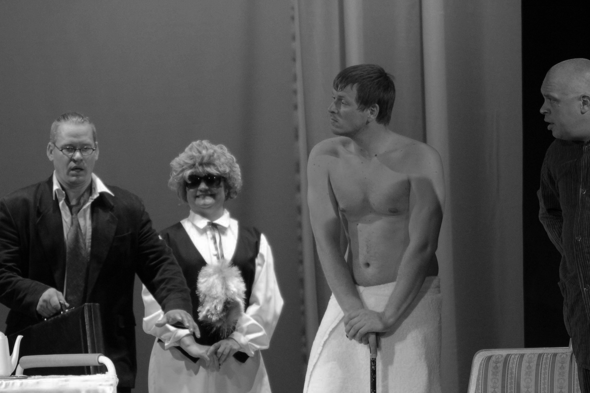 Teater Karakteri lavastus "Igaühele oma"